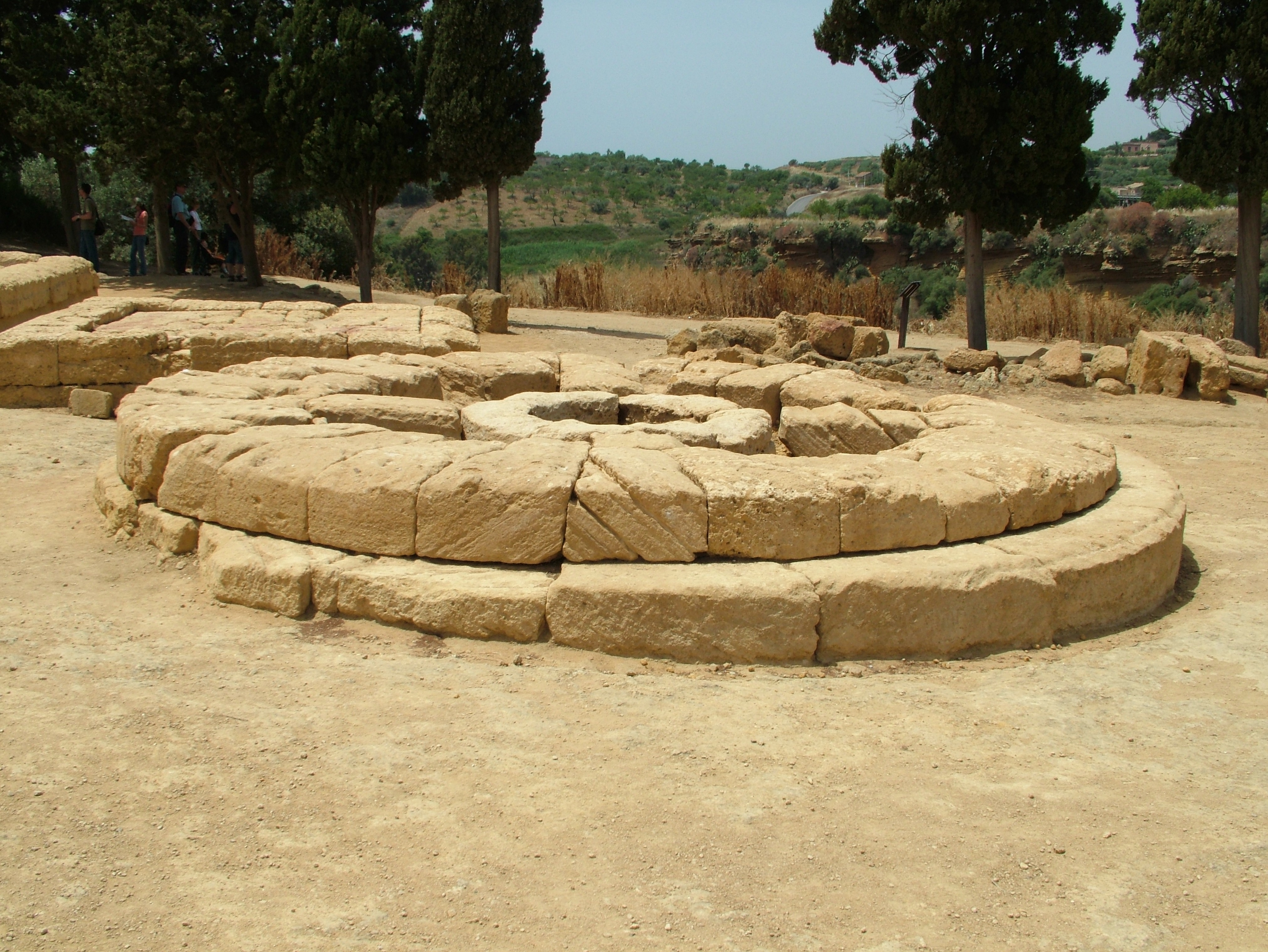 Agrigento, Sizilien, Heiligtum der chthonischne Gottheiten, ein Fundament